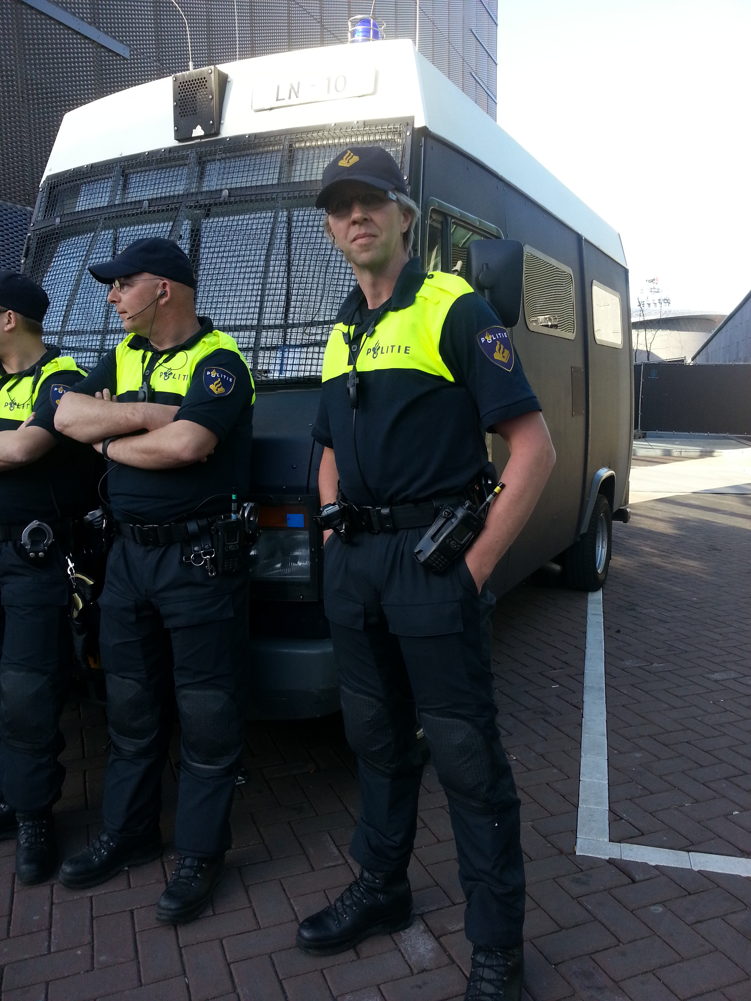 Een agent van de Mobiele Eenheid in Amsterdam tijdens Koninginnedag 2013 in het nieuwe uniform.